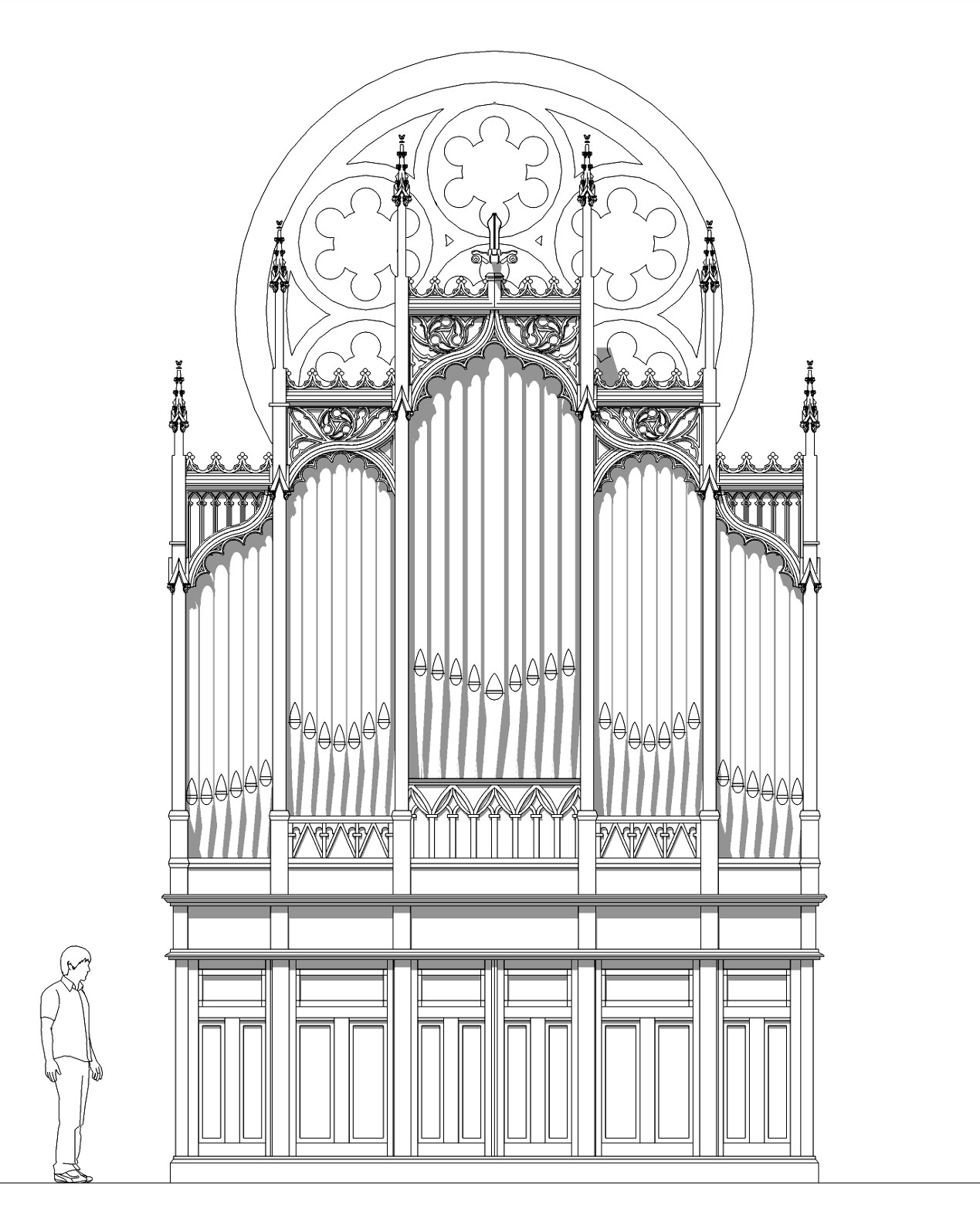 Redessin du buffet de l'orgue Joseph Merklin (1882) de l'église Saint-Laurent du Puy-en-Velay en Haute-Loire (43), France. Rendu : export 2D sur le logiciel 3D Sketchup. Autres images du même modèle 3D (2011)